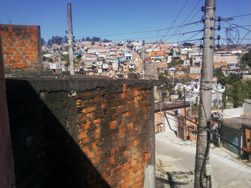 Foto do detalhe de visão para o morro da Vila Yolanda II.